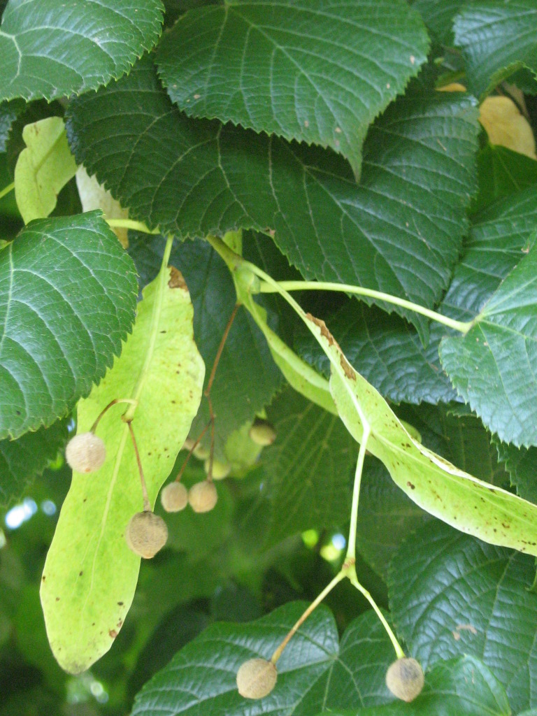 Fiori e frutti di Tilia platyphyllos